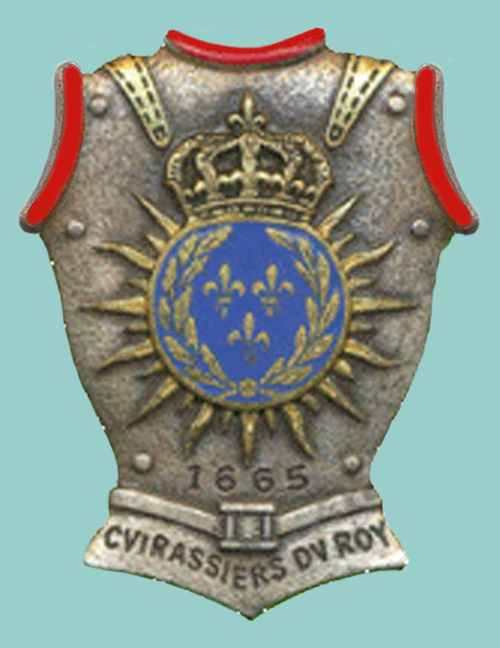 Insignie du 8e régiment de cuirassiers (France) Insigne de 1954